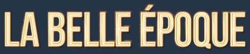 Logo du film La Belle Époque, écrit et réalisé Nicolas Bedos, sorti en 2019.